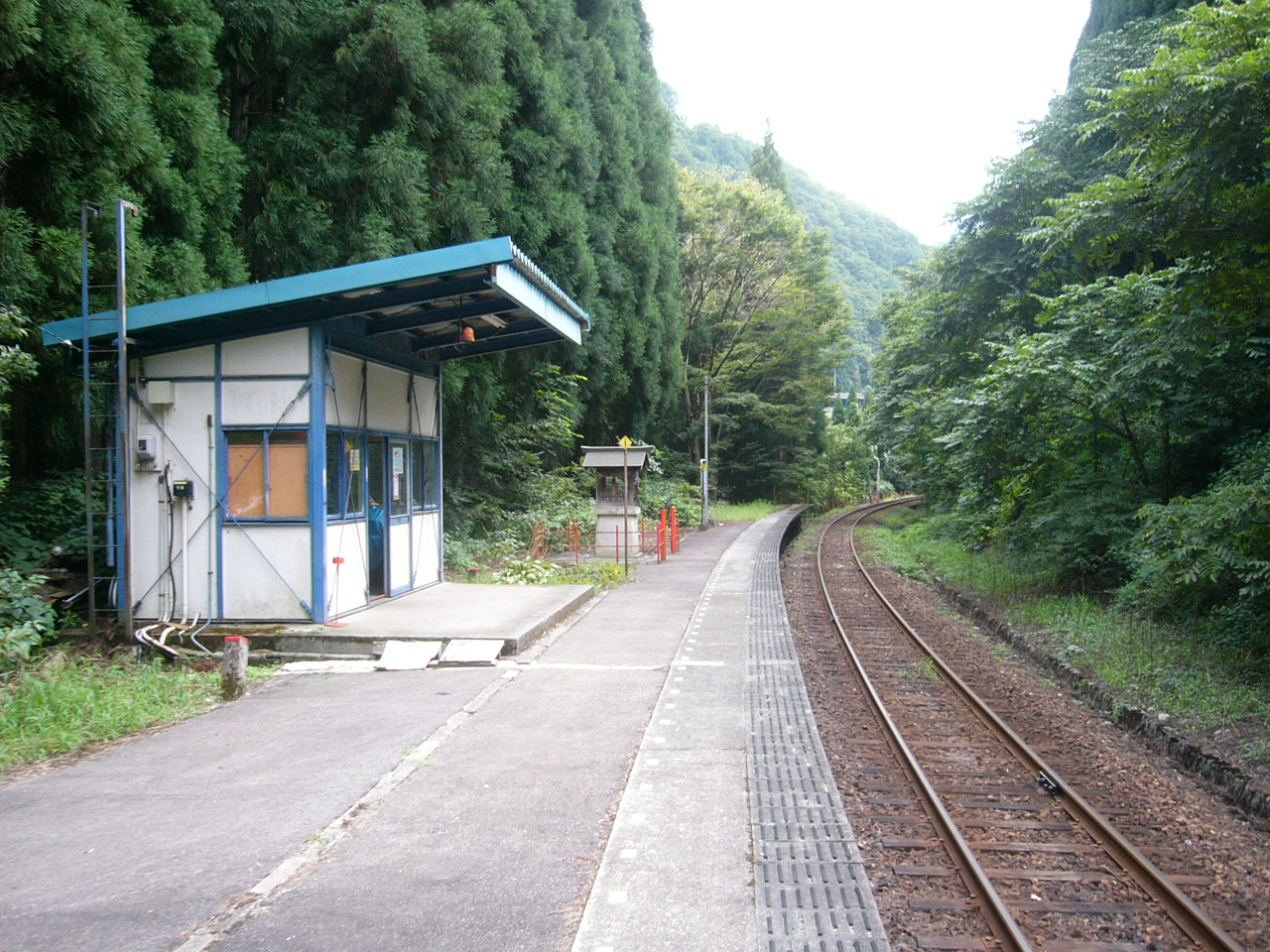 Urushiyama Station